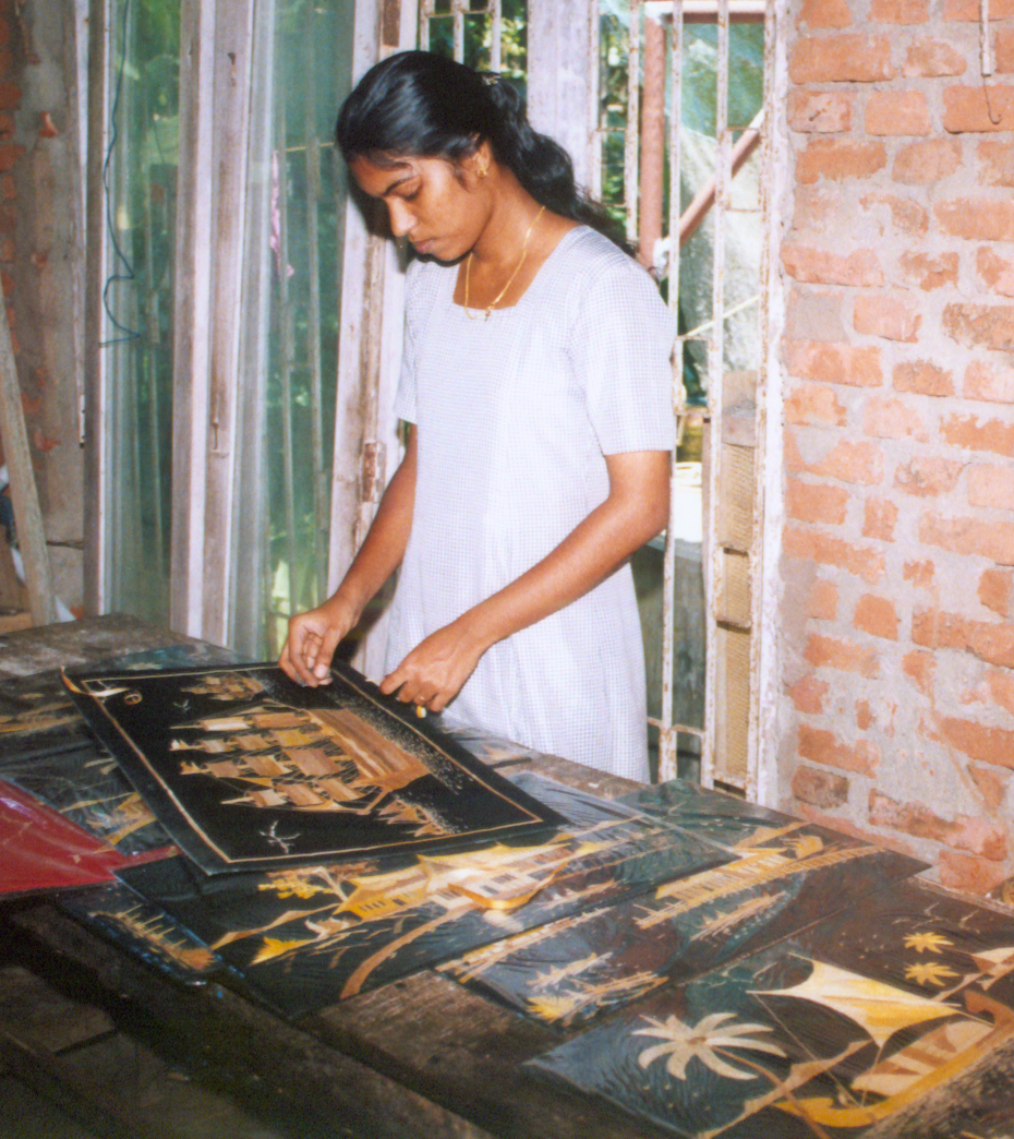 കച്ചി പട നിർമ്മാണത്തിൽ ഏർപ്പെട്ടിരിക്കുന്ന യുവതി